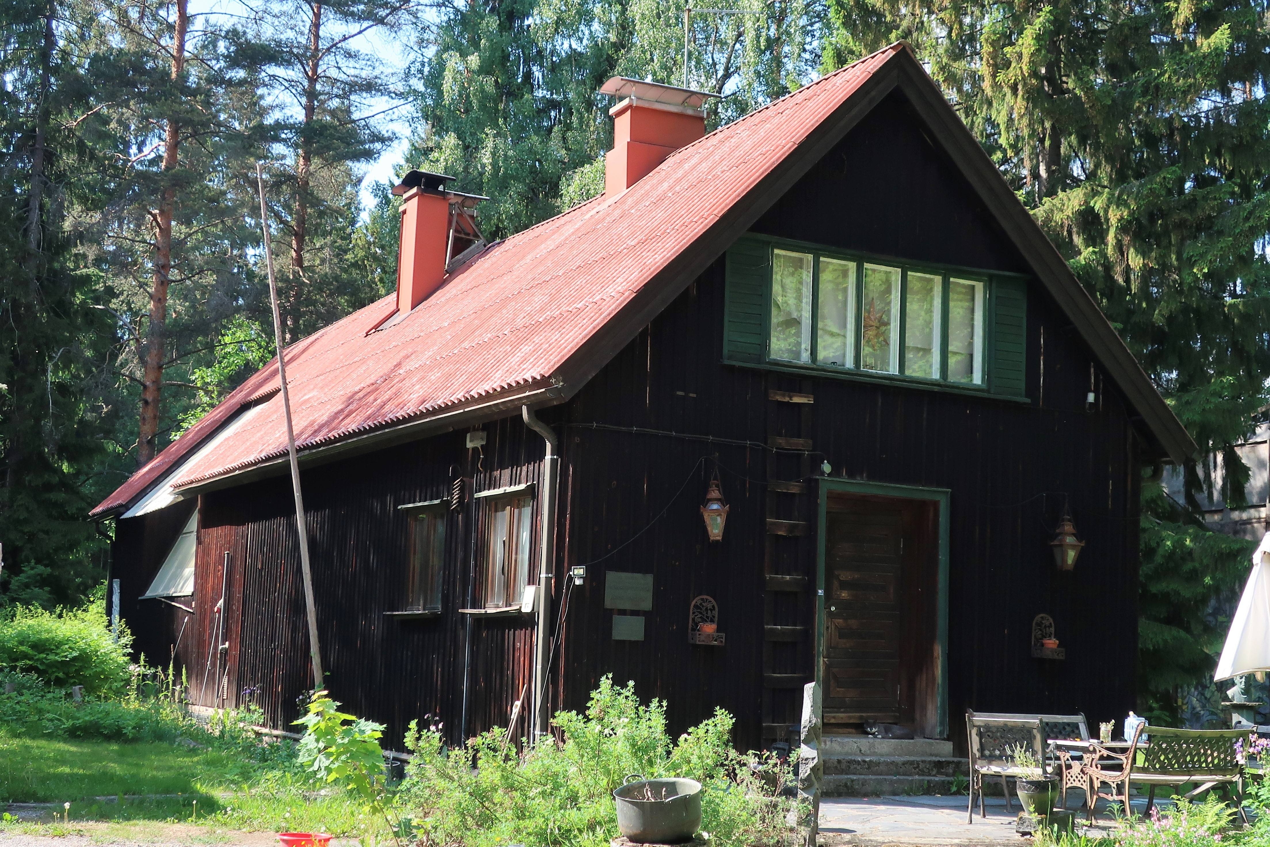 talvella 1915 valmistunut huvila, jossa on ateljeetilat, kansallisromanttisia piirteitä